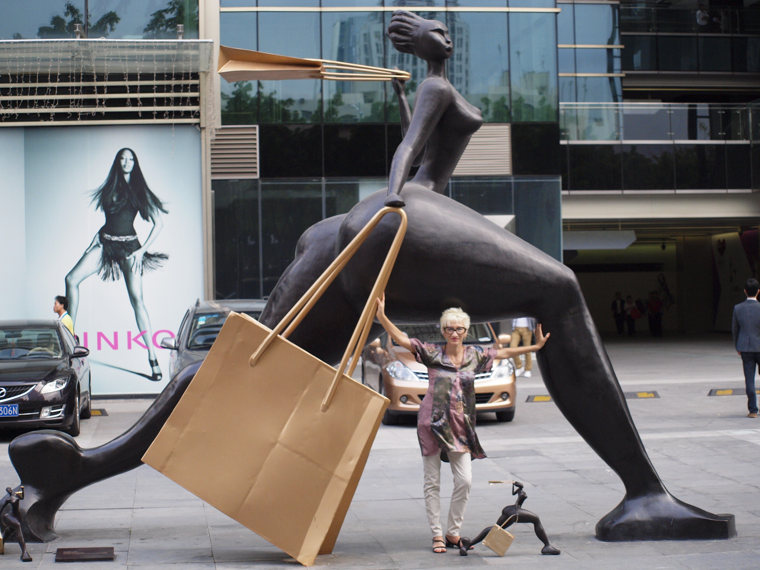 statue bronze